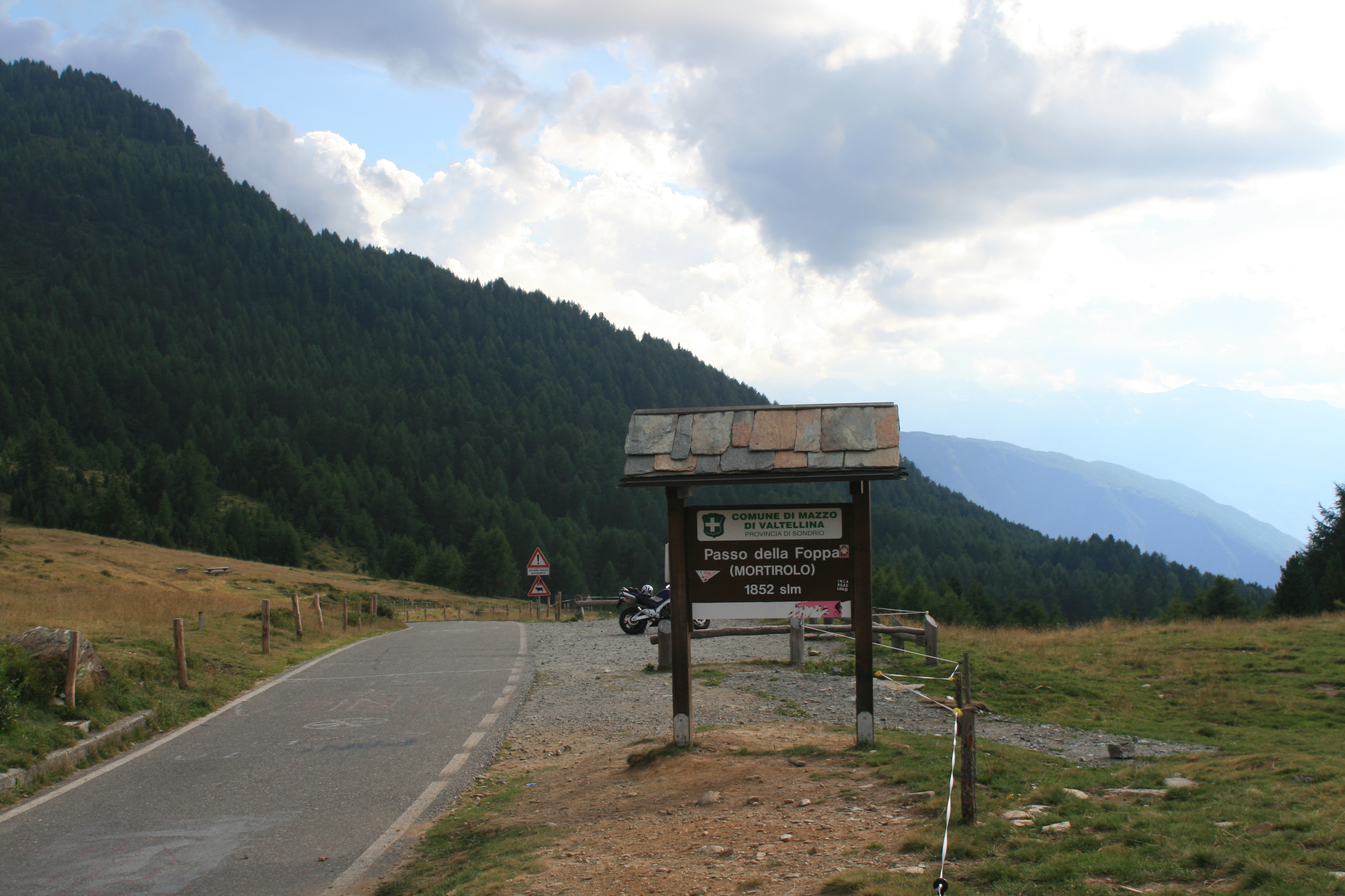 Passo della Foppa (MORTIROLO) 1852 m slm